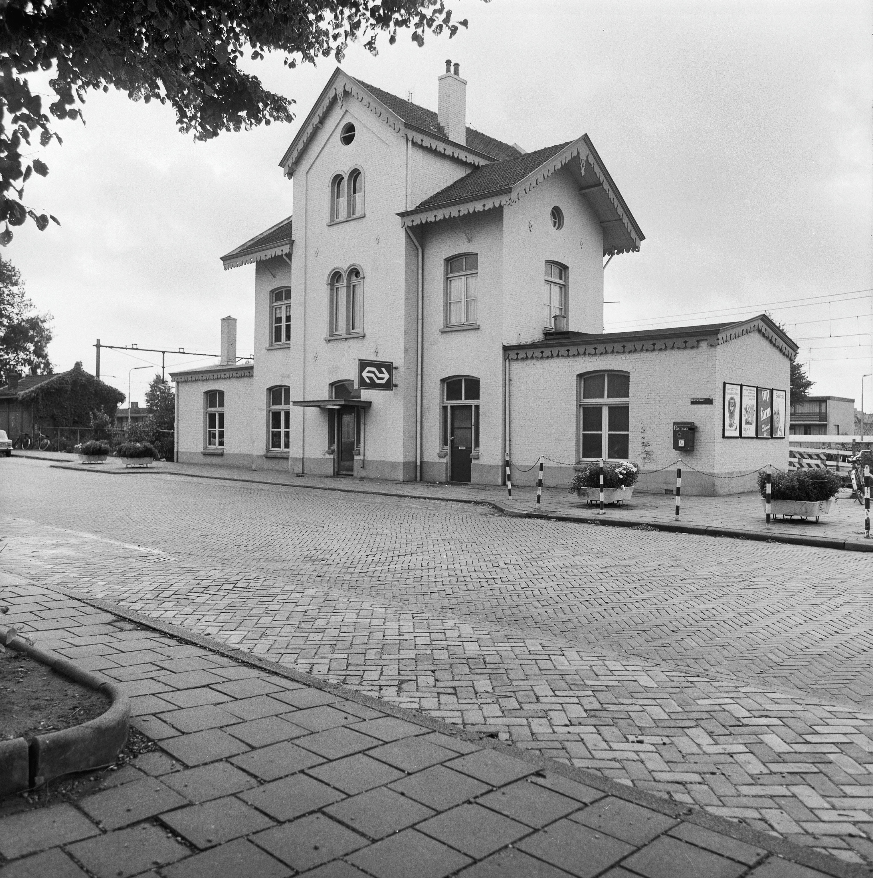 Station N.S: voorgevel